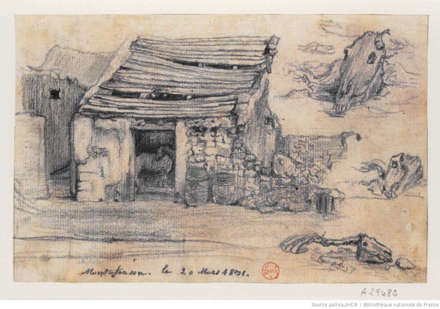 Dessin d'une masure de Montfaucon en 1831. On y voit les chevaux prêts à être abattus, et leurs carcasses.